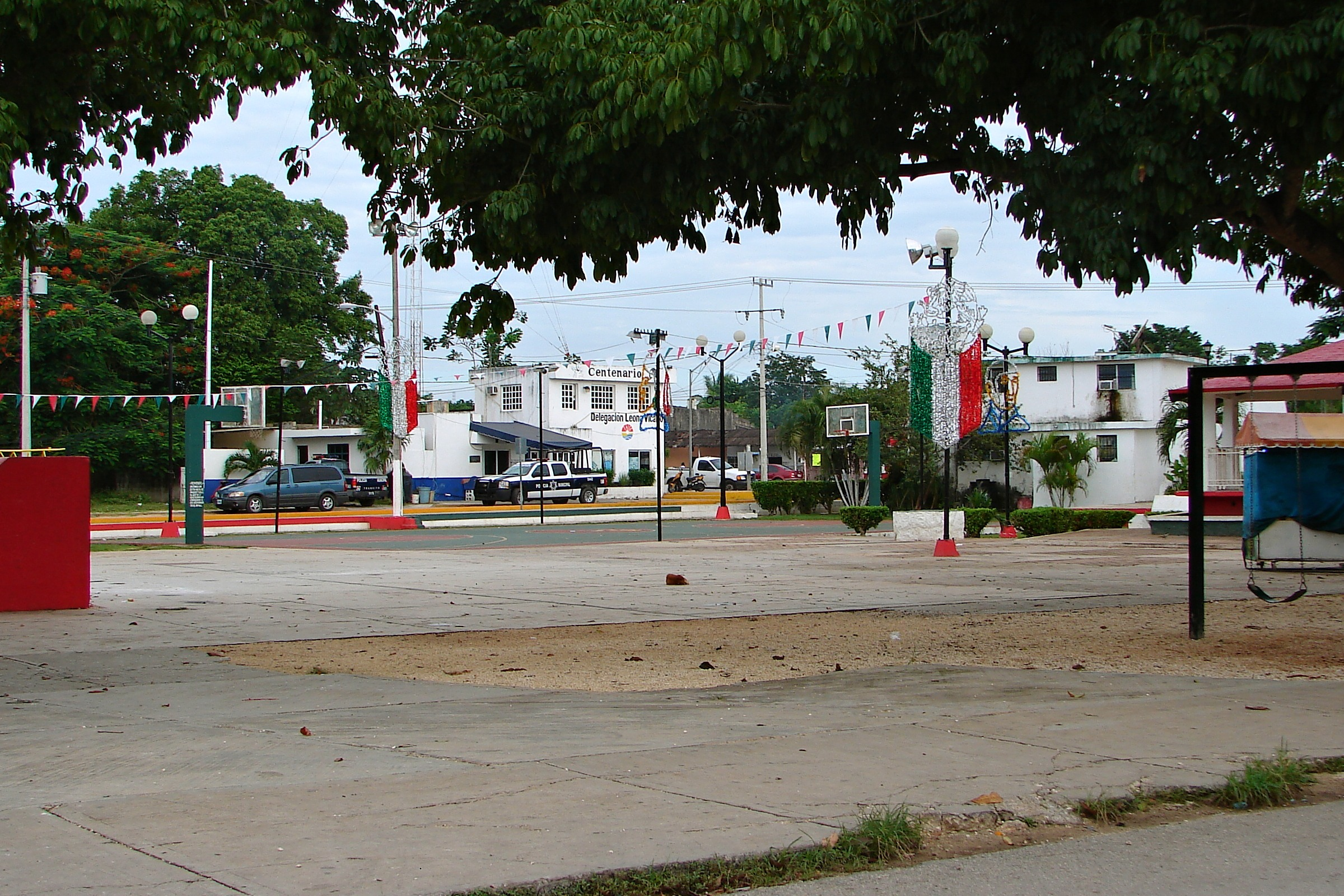 Leona Vicario, Quintana Roo, Mexico